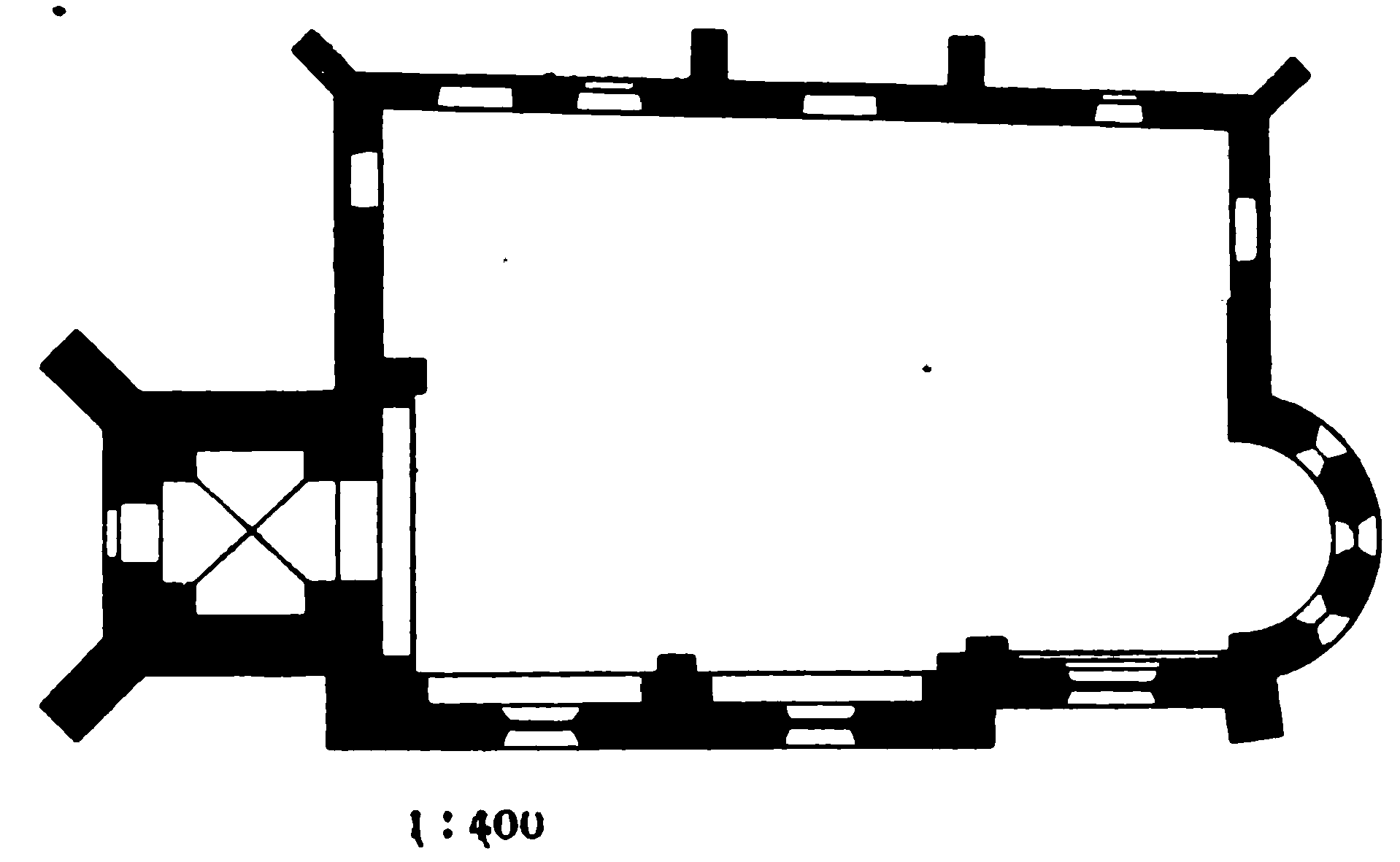 Grundriss der Ev. Kirche in Holzhausen, Stadt Porta Westfalica